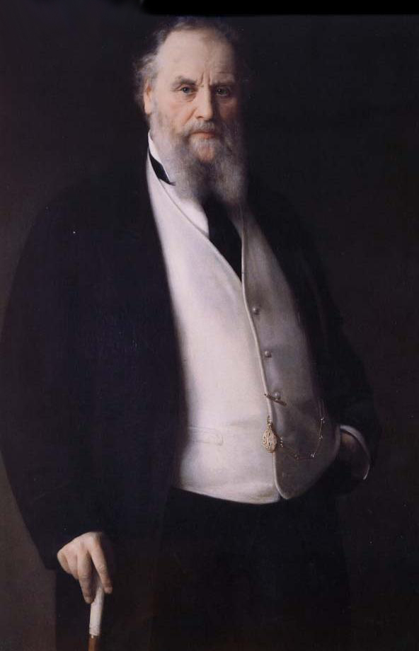 Portrait of Aristide Boucicaut